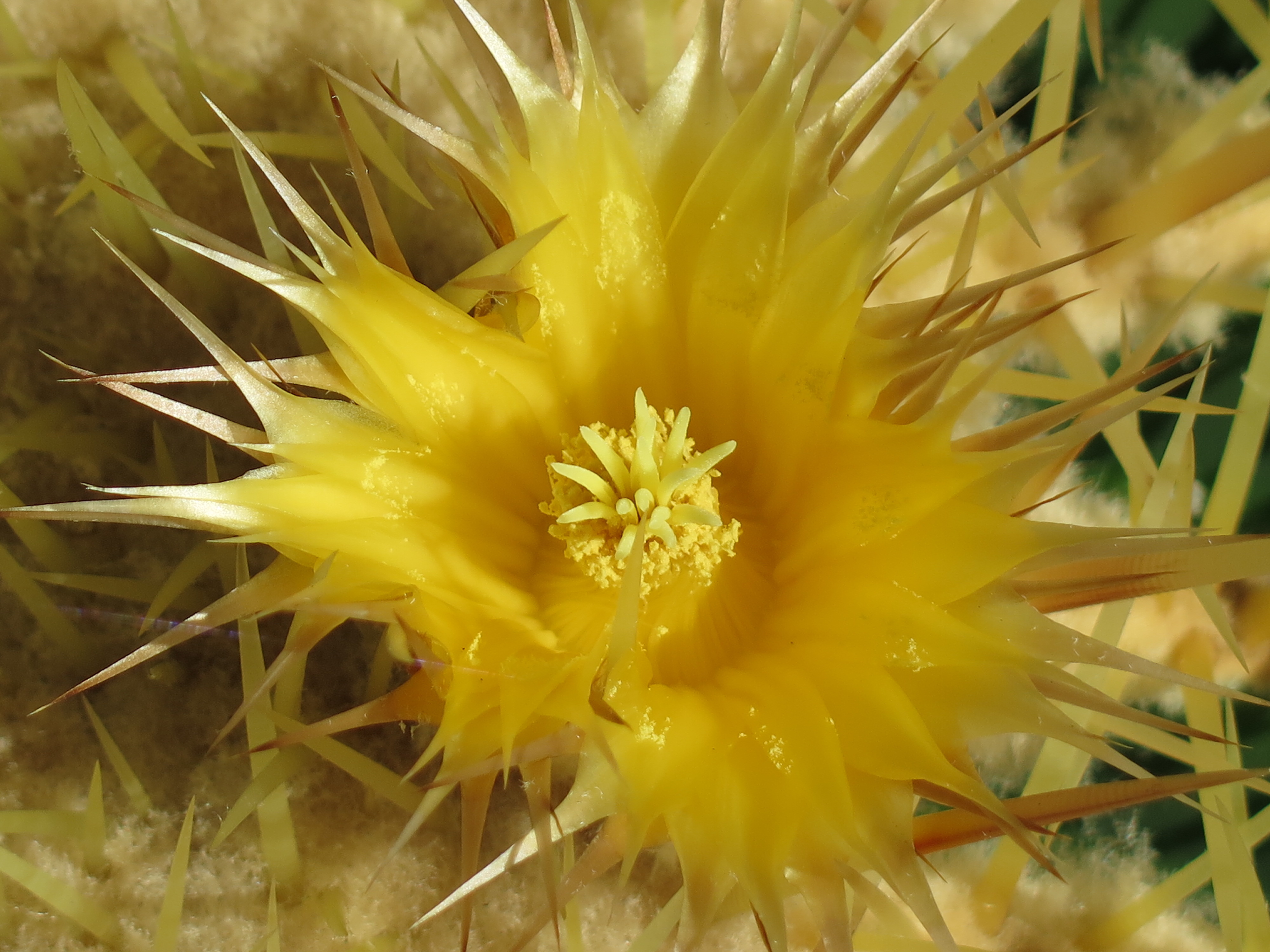 Il fiore dell'echinocactus grusonii